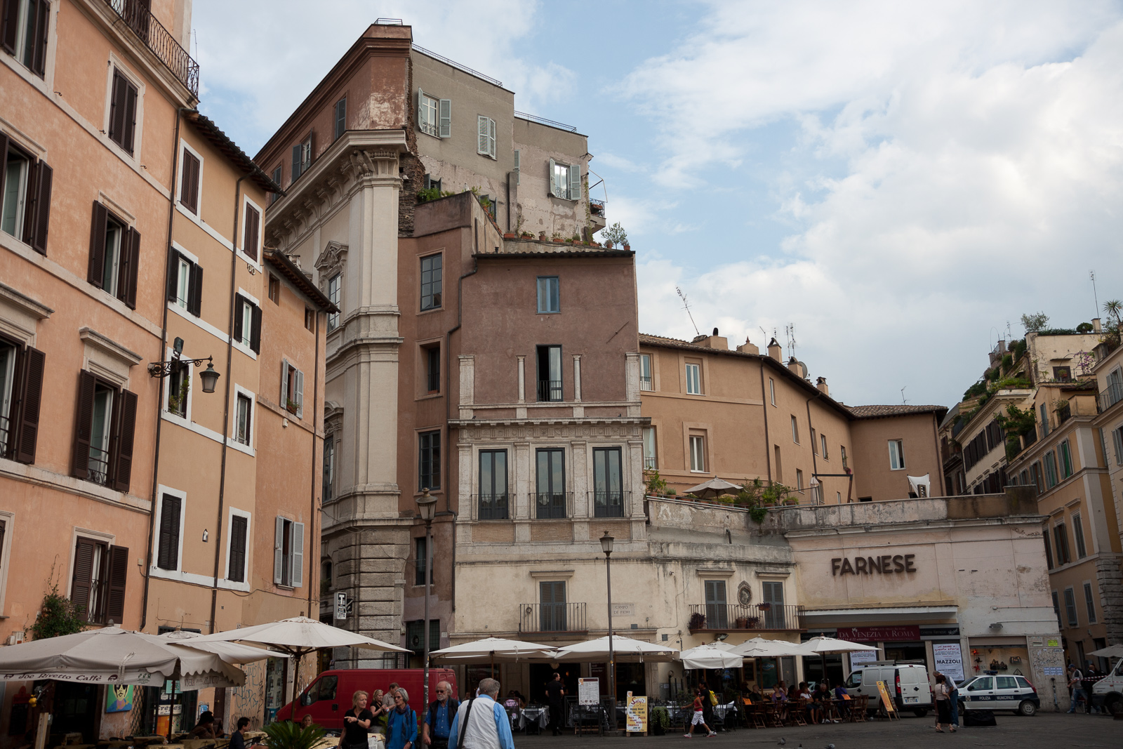 Rione VI Parione, 00186 Roma, Italy